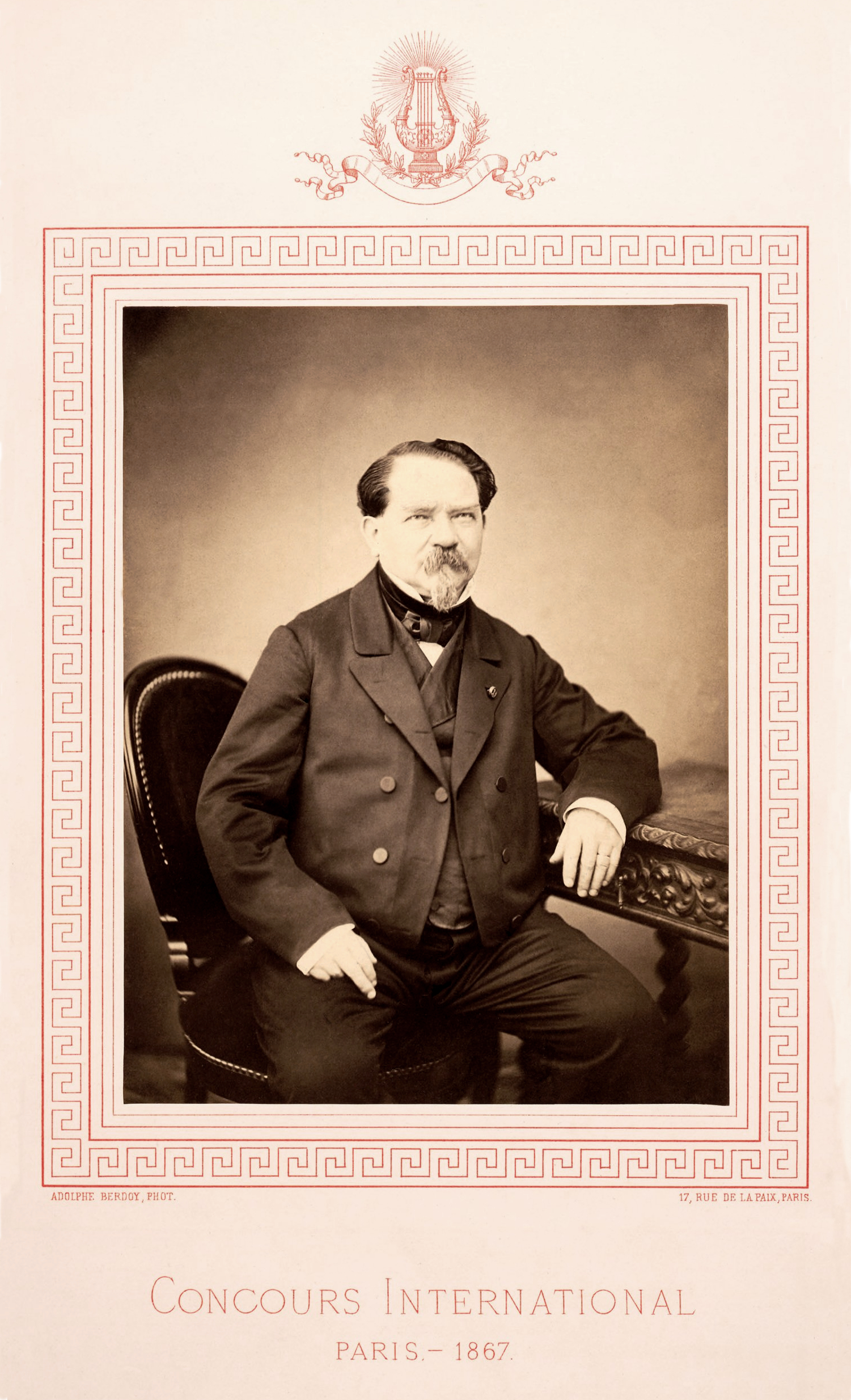 Jean-Georges Kastner, (1810 - 1867), compositeur français.